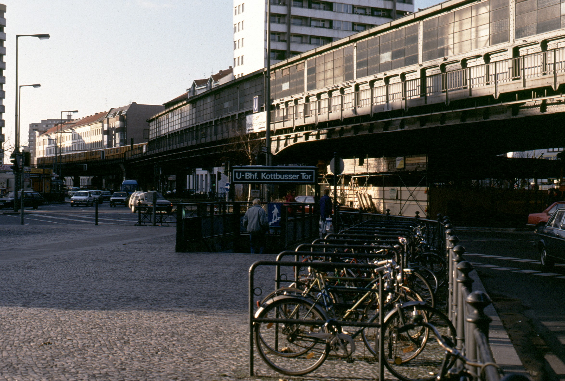 Hochbahnhof Kottbusser Tor Berlin